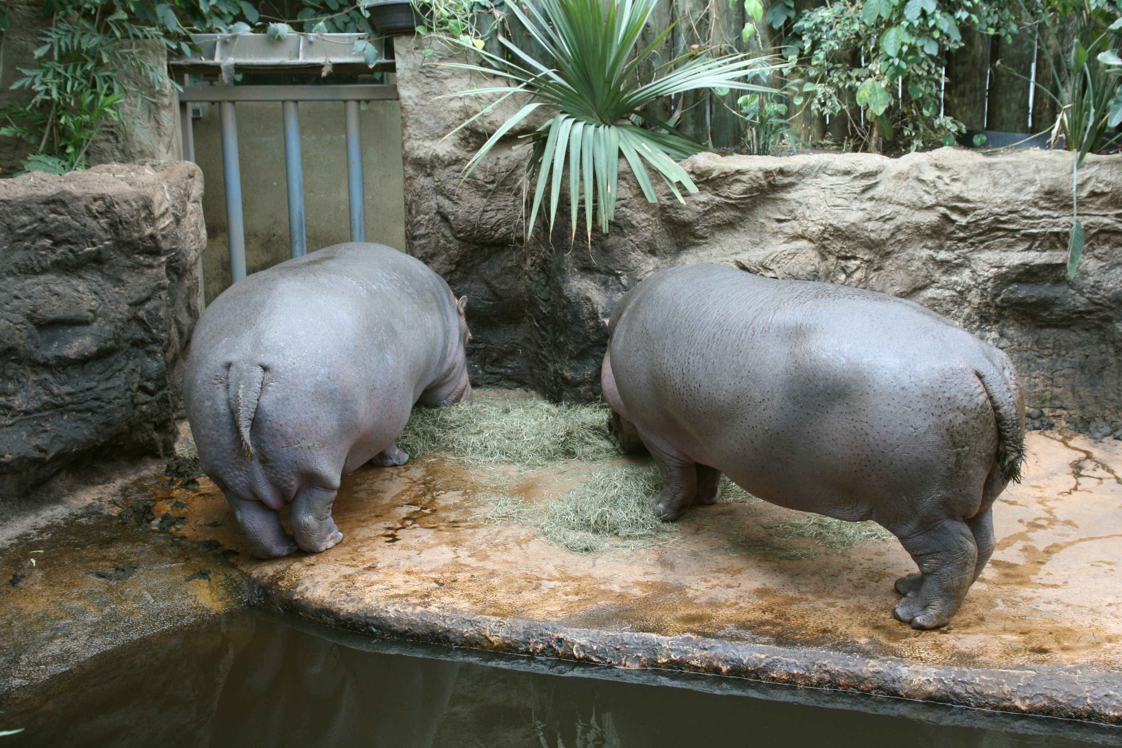 Hippopotamus amphibius, Afrika in der ZOOM Erlebniswelt in Gelsenkirchen